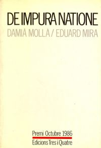 Portada del llibre "De Impura Natione".